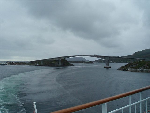 Stokkøybrua i Åfjord, sett fra Hurtigruta (Stokkøy bridge, Åfjord Sør-Trøndelag Norway, seen from the Coastal Express